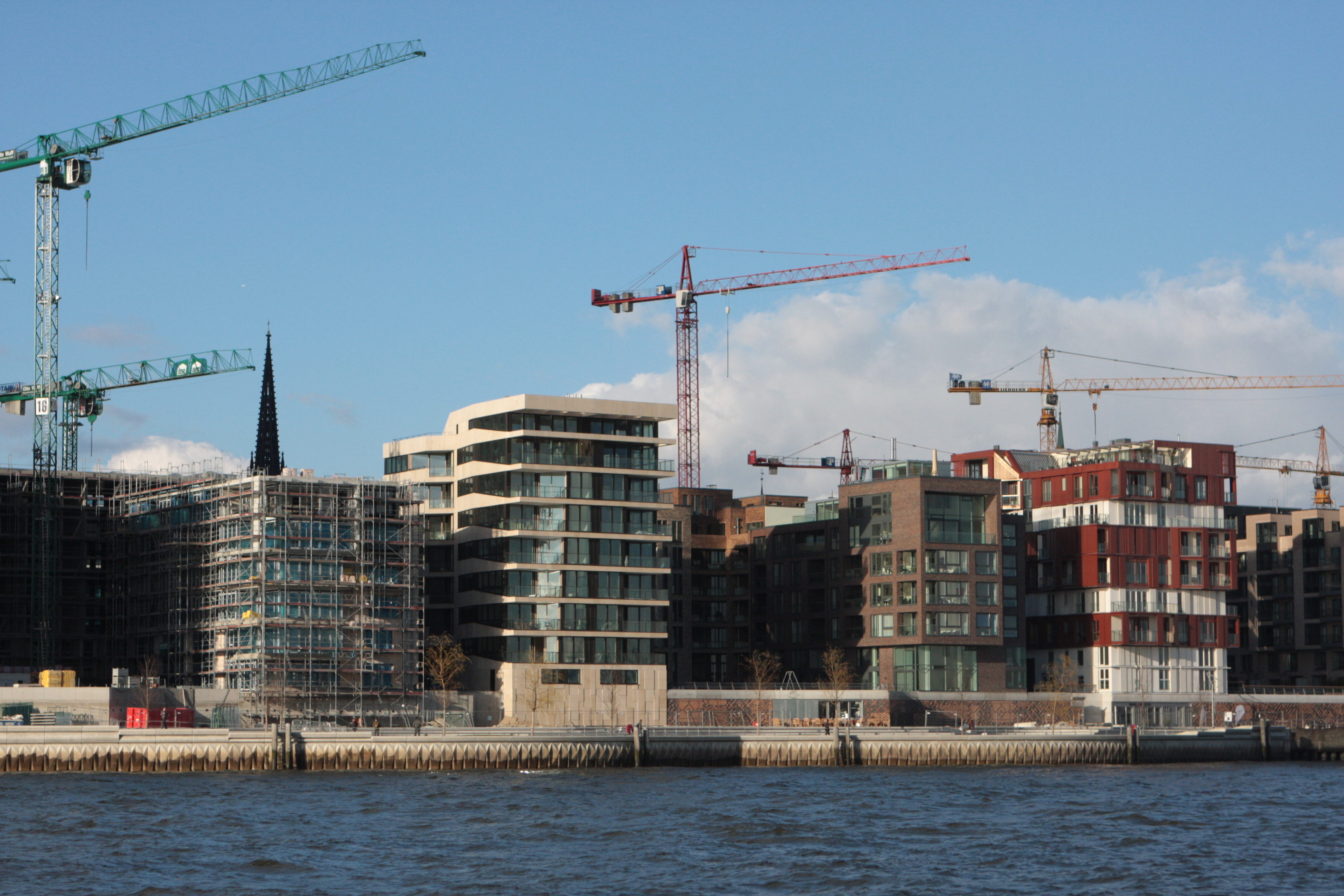 Großbaustelle Hamburg Hafencity im Frühjahr 2008